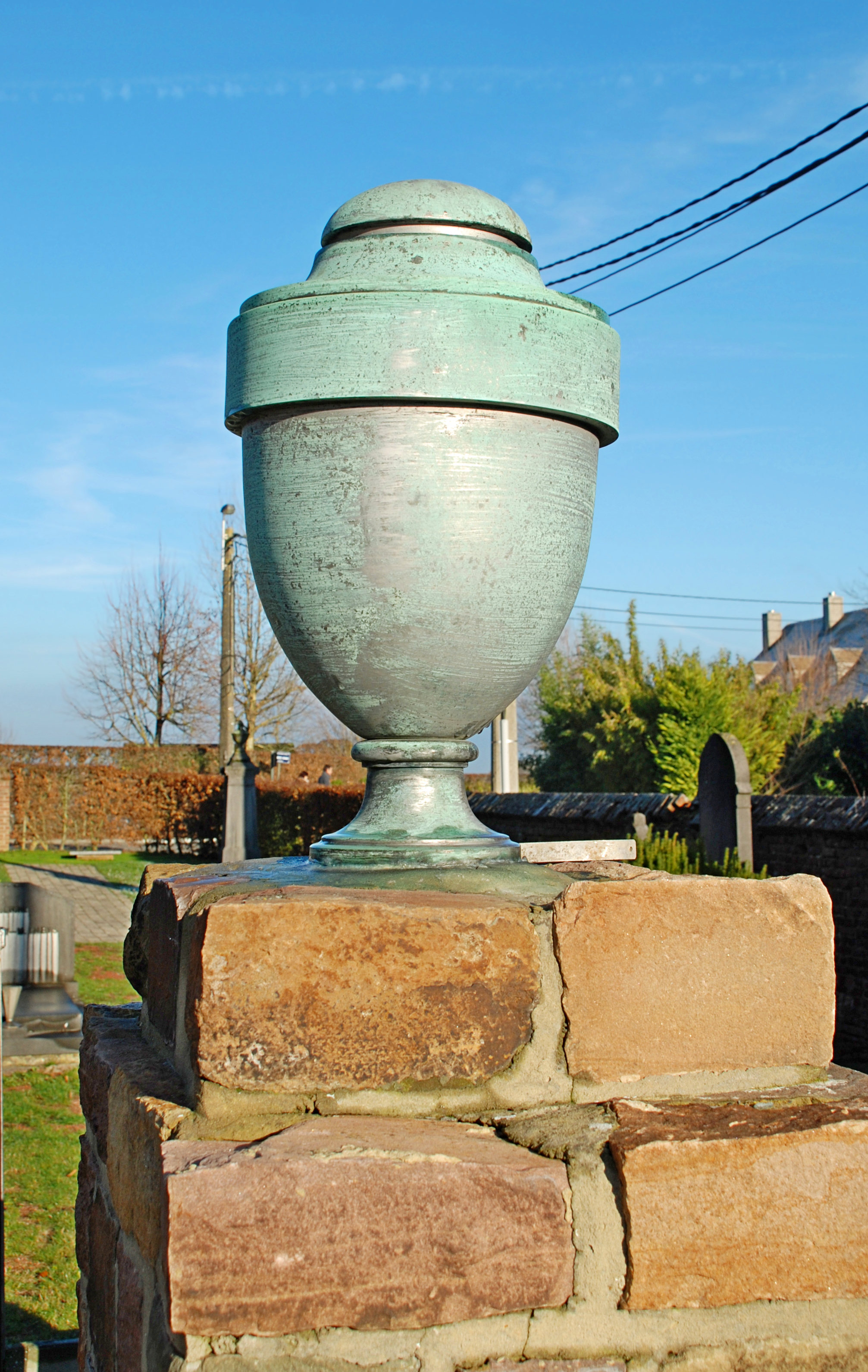 Belgique - Brabant wallon - Ottignies-Louvain-la-Neuve - Céroux - église Notre-Dame de Bon Secours (néo-gothique, Antoine Moreau, 1848) - Cimetière - carré militaire